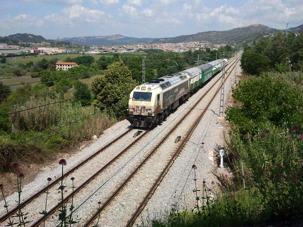 La locomotora 333.369, con un herbicida, pasando por la línea Barcelona - Manresa - Lleida a la altura de Castellbell i el Vilar (Barcelona, Cataluña).